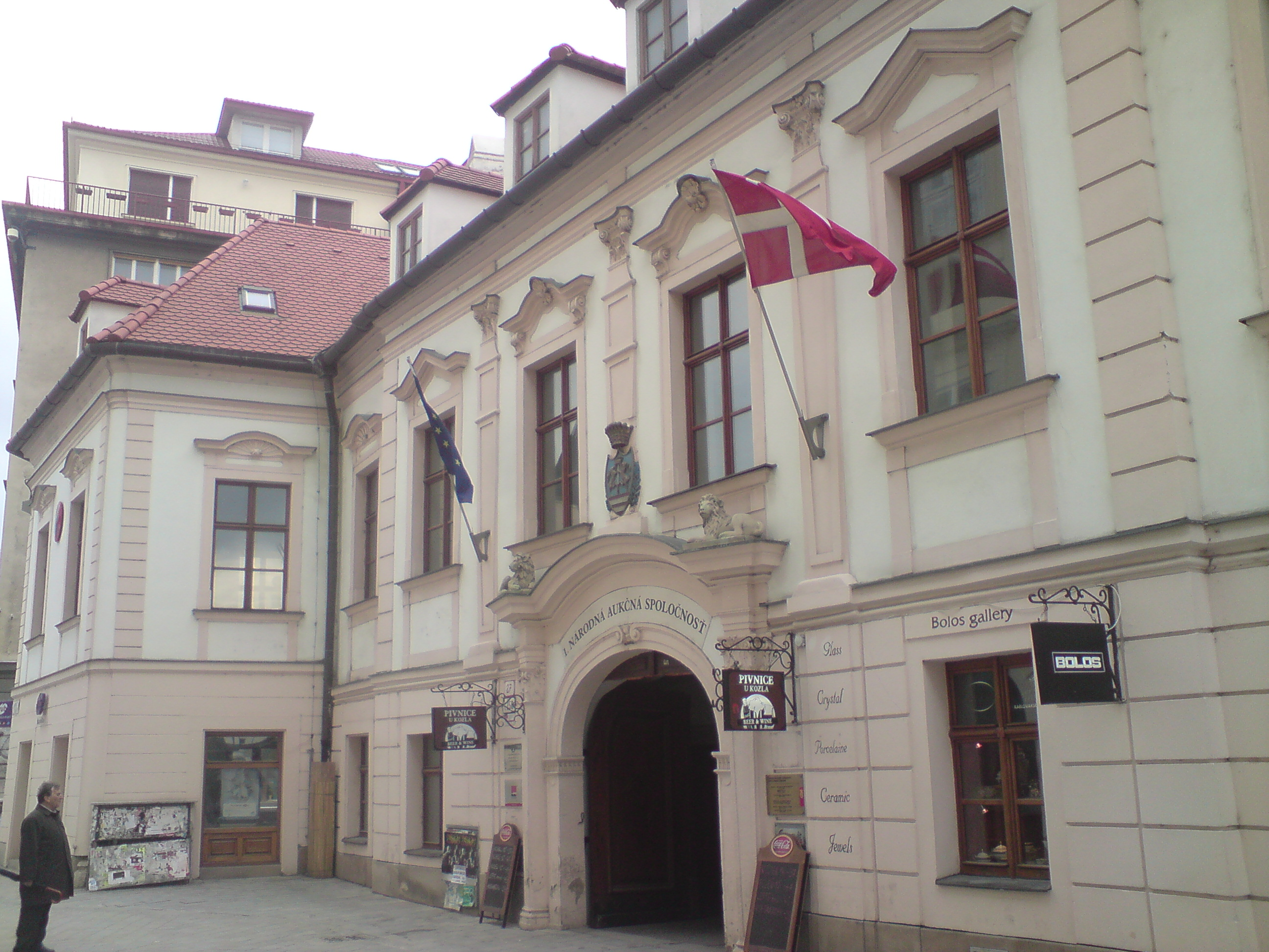 Keglevičov palác, Panská, Bratislava